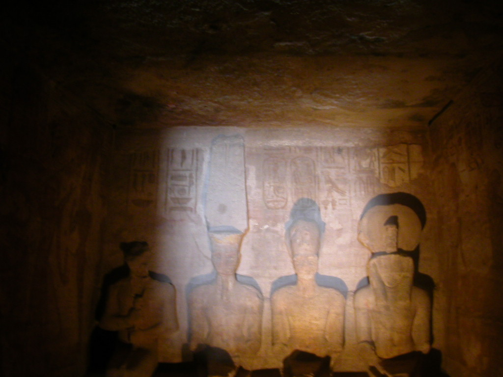 Das Allerheiligste im Tempel von Abu Simbel